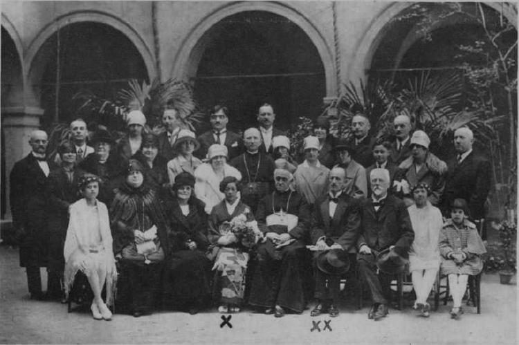 Slovestnost ob prestopu Kondo-Kavese Tsuneko iz budistične v katoliško vero. Prejela je štiri zakramente: sv. krst, sv. birmo, prvo sv. obhajilo in sv. zakon. Kondo-Kavese Tsuneko (X), njen mož Ivan Skušek (XX), med njima je škof Anton Bonaventura Jeglič.